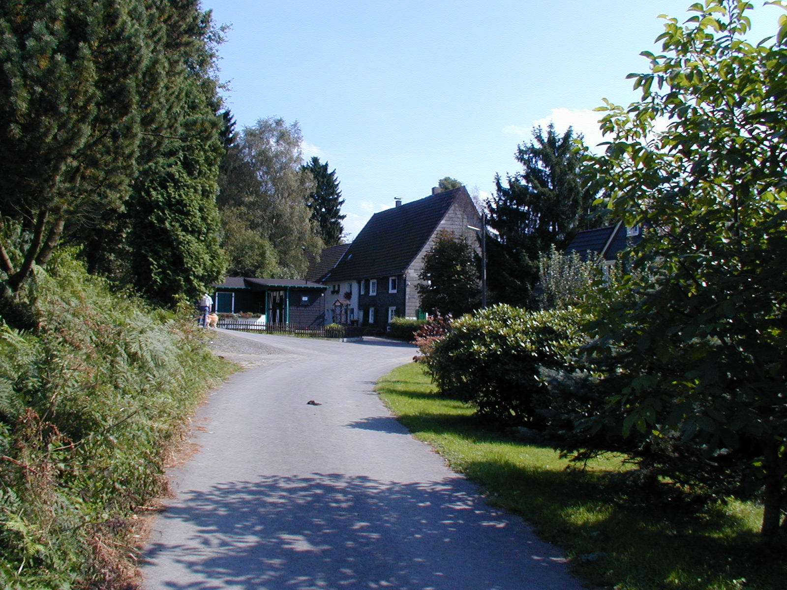 Remscheid-Niederfeldbach